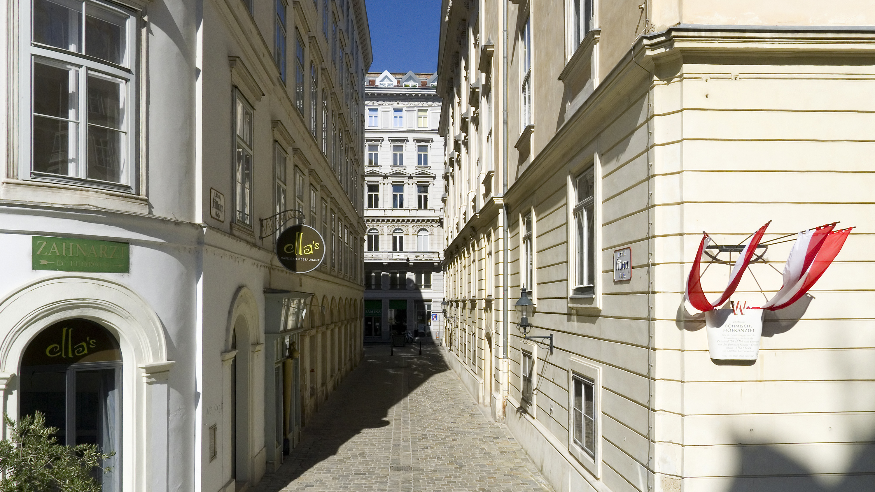 Fütterergasse in Wien 1 beim Judenplatz Richtung Norden